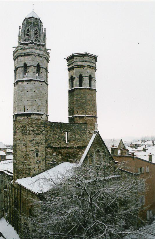 Le Vieux-Saint-Vincent, ancienne cathédrale de Mâcon (Saône-et-Loire, sud de la Bourgogne, France)